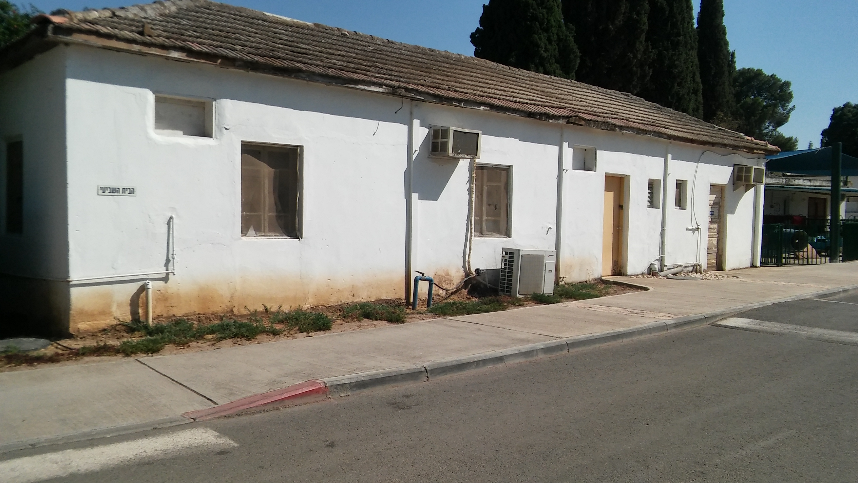 איילת השחר - מבני הפרסה - בית 7